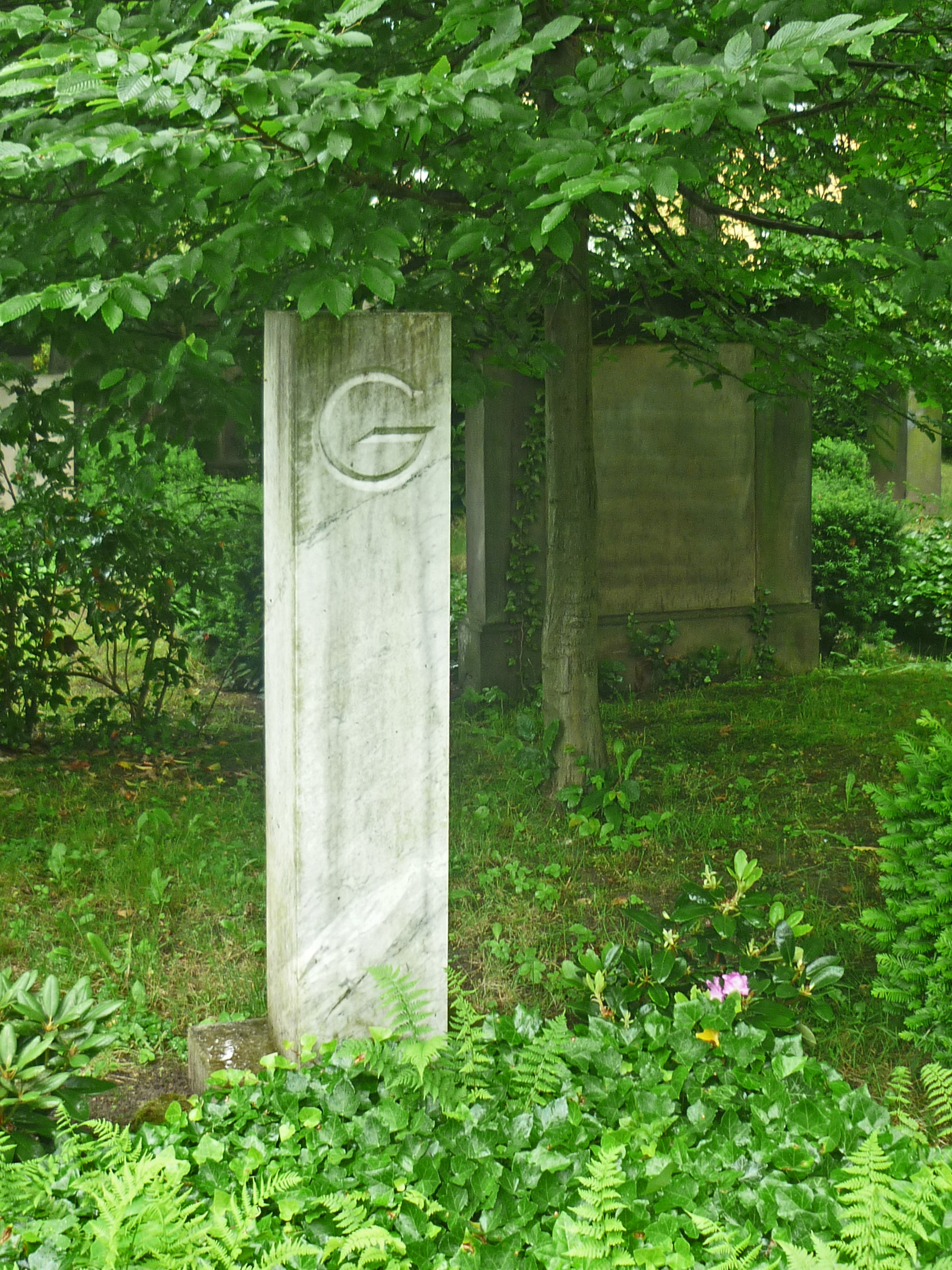 Loschwitzer Friedhof in Dresden-Loschwitz: Grabstätte Hermann Glöckner (1889–1987), Maler, Zeichner und Bildhauer